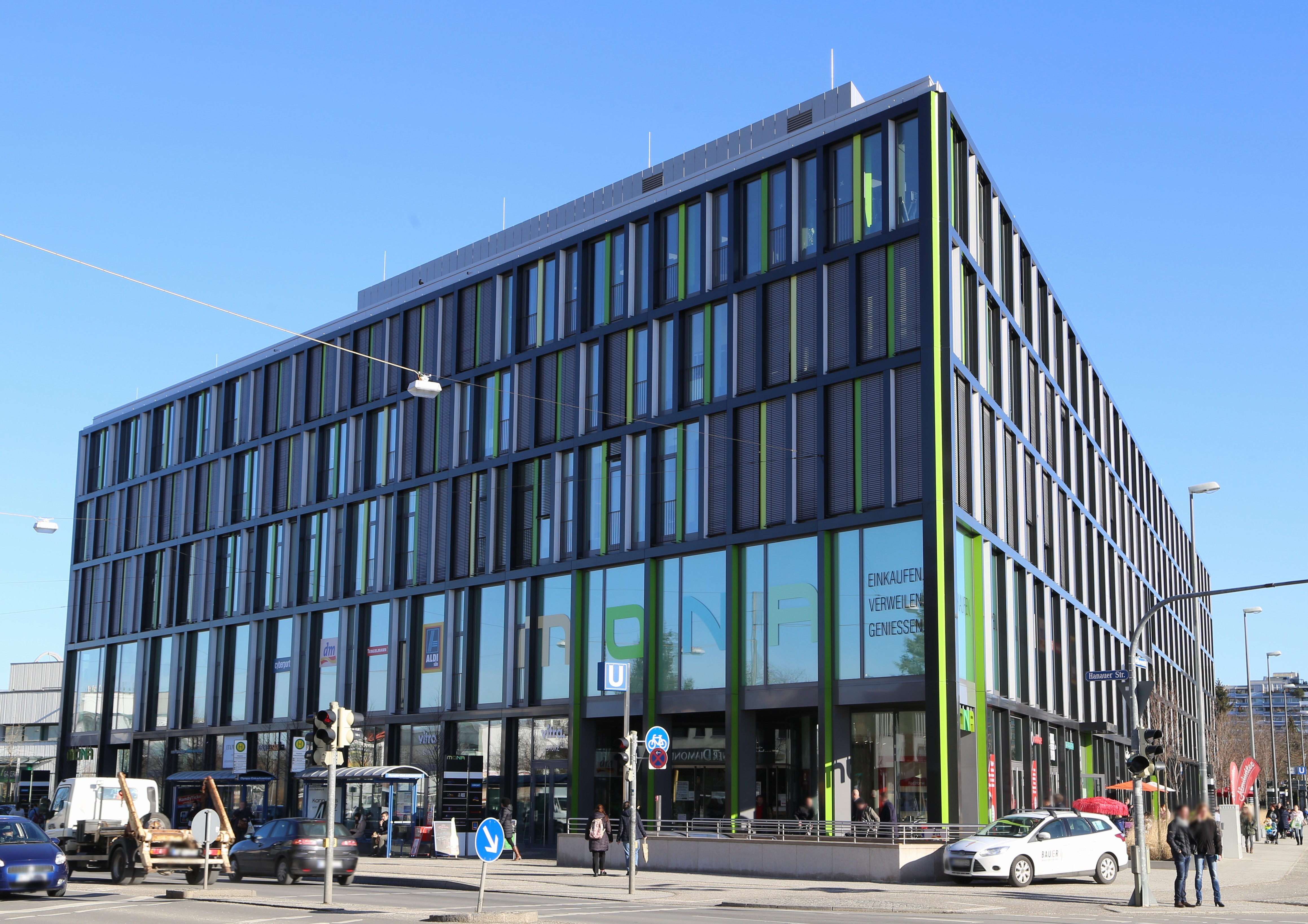 Mona (Einkaufszentrum), Pelkovenstraße in Moosach, München